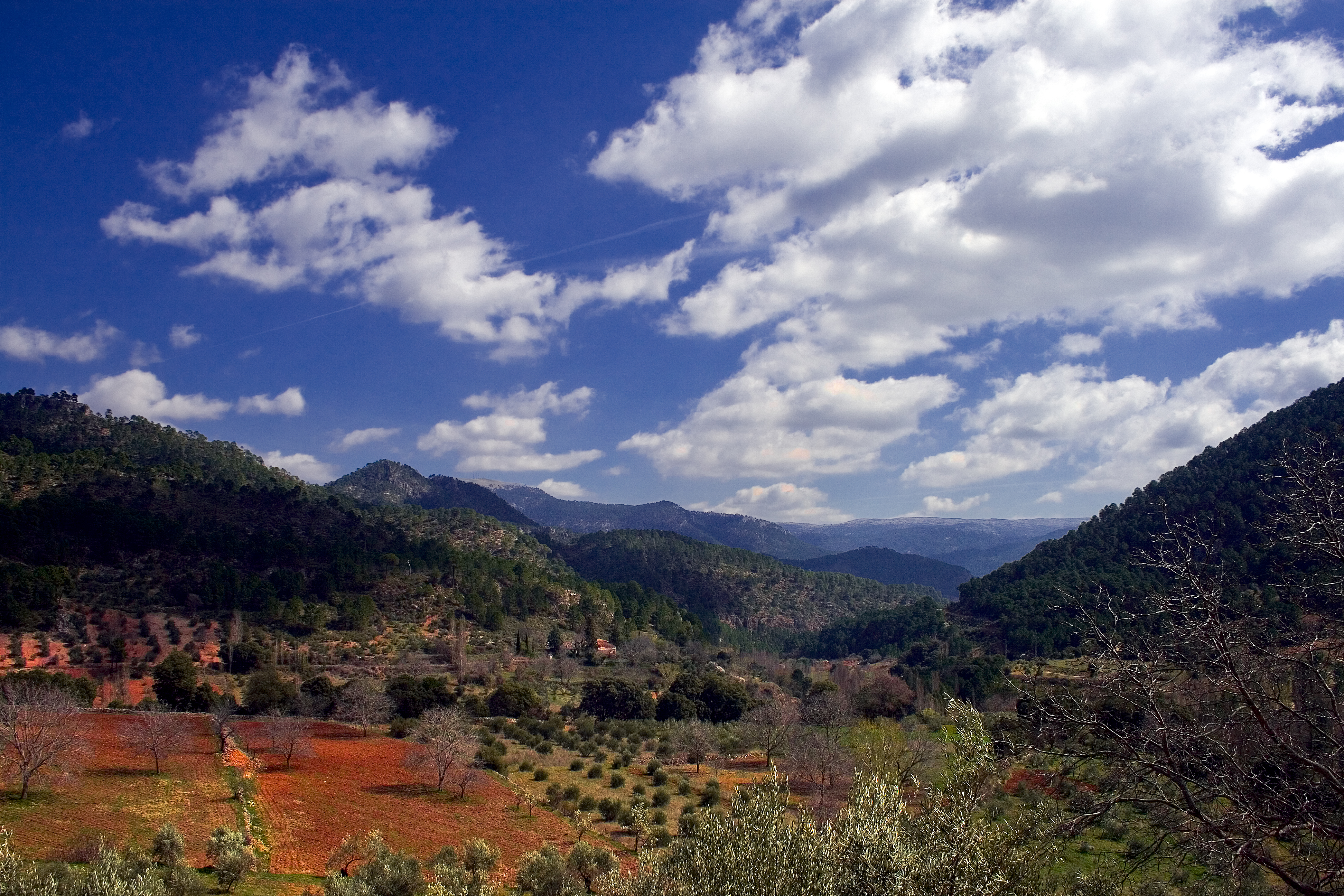 Sierra de Alcaraz